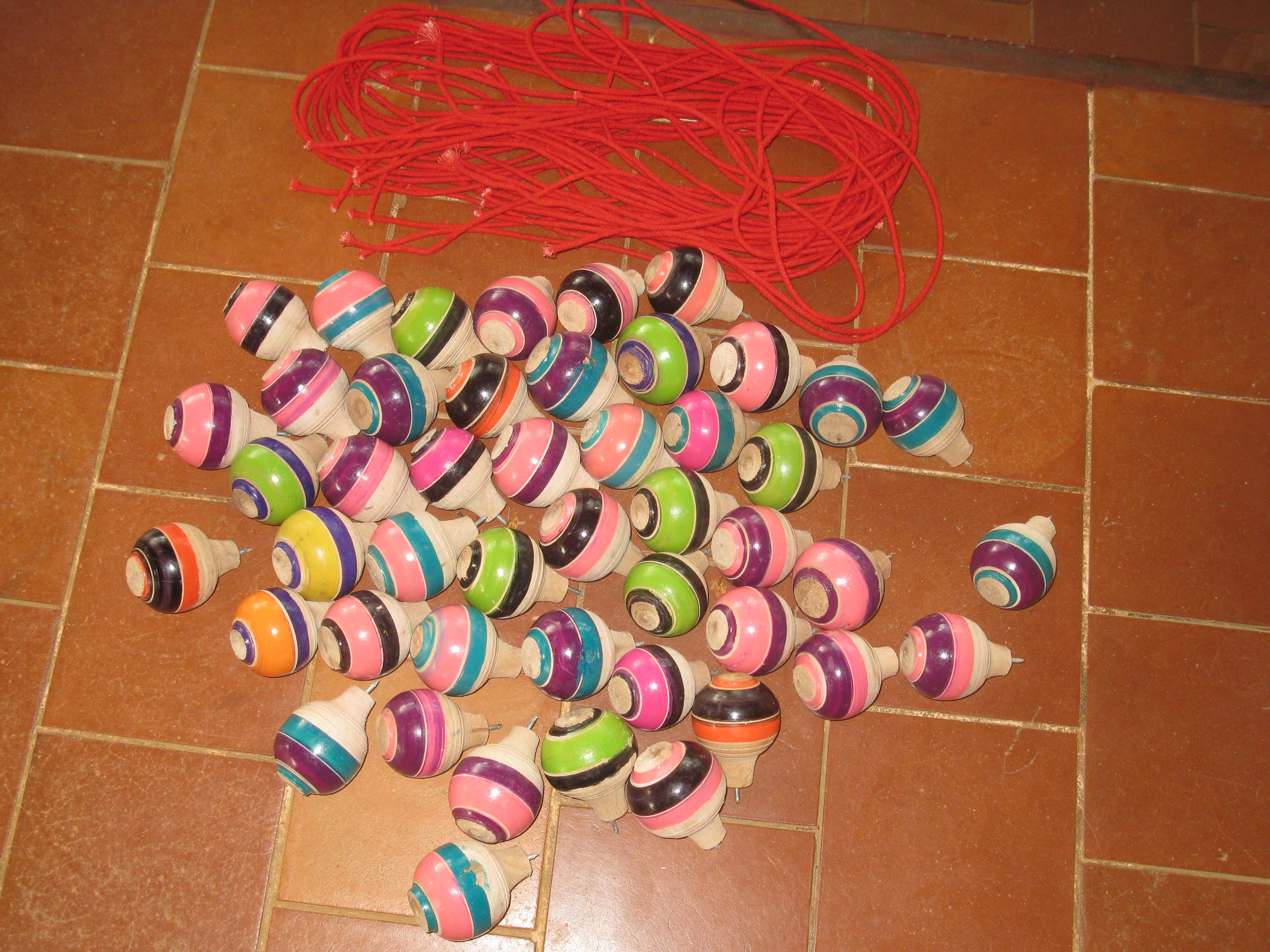 ഒരു കൂട്ടം പമ്പരങ്ങൾ